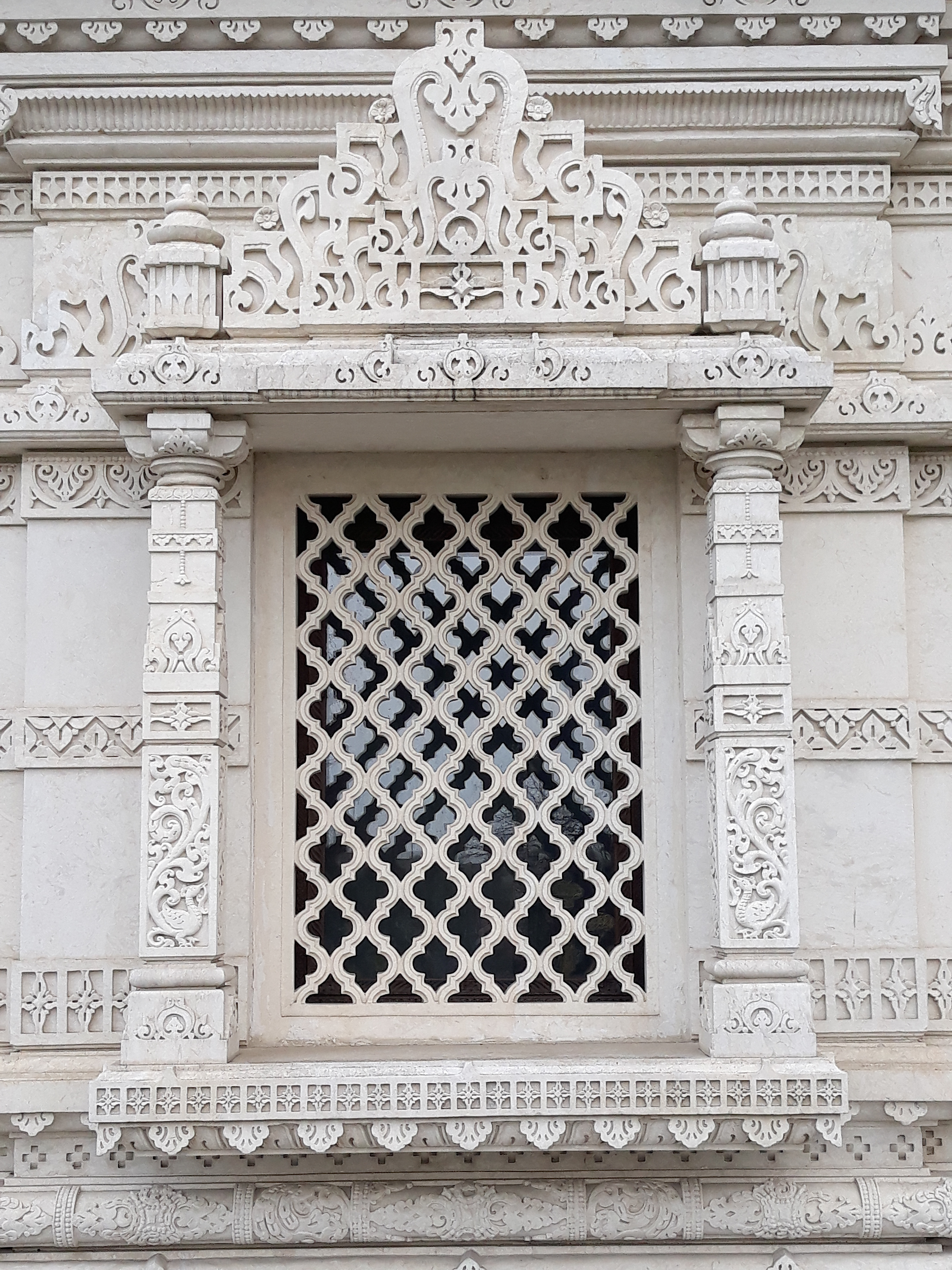 Dettaglio del Shri Swaminarayan Mandir di Londra